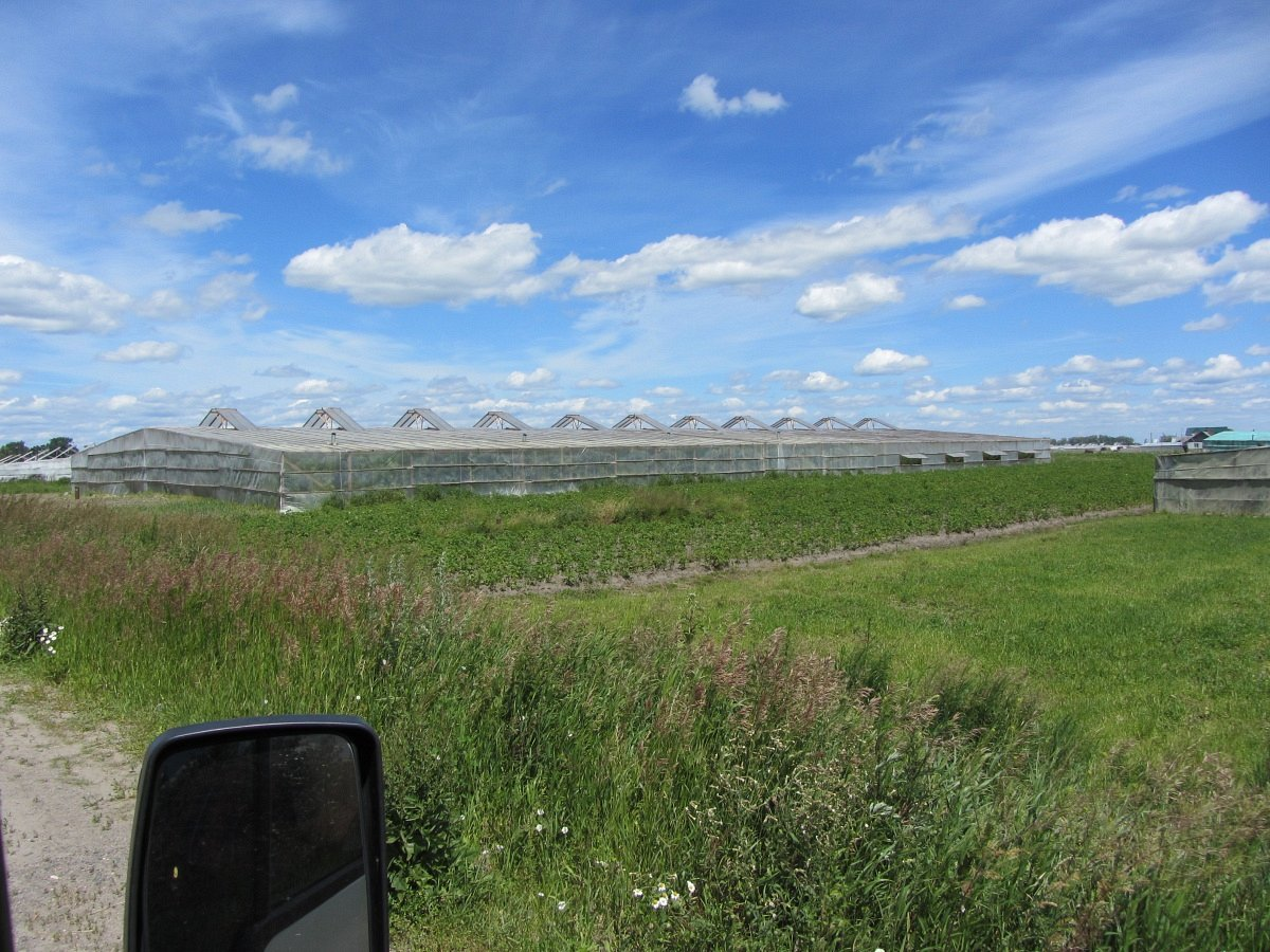 Альшаны. Цяпліцы